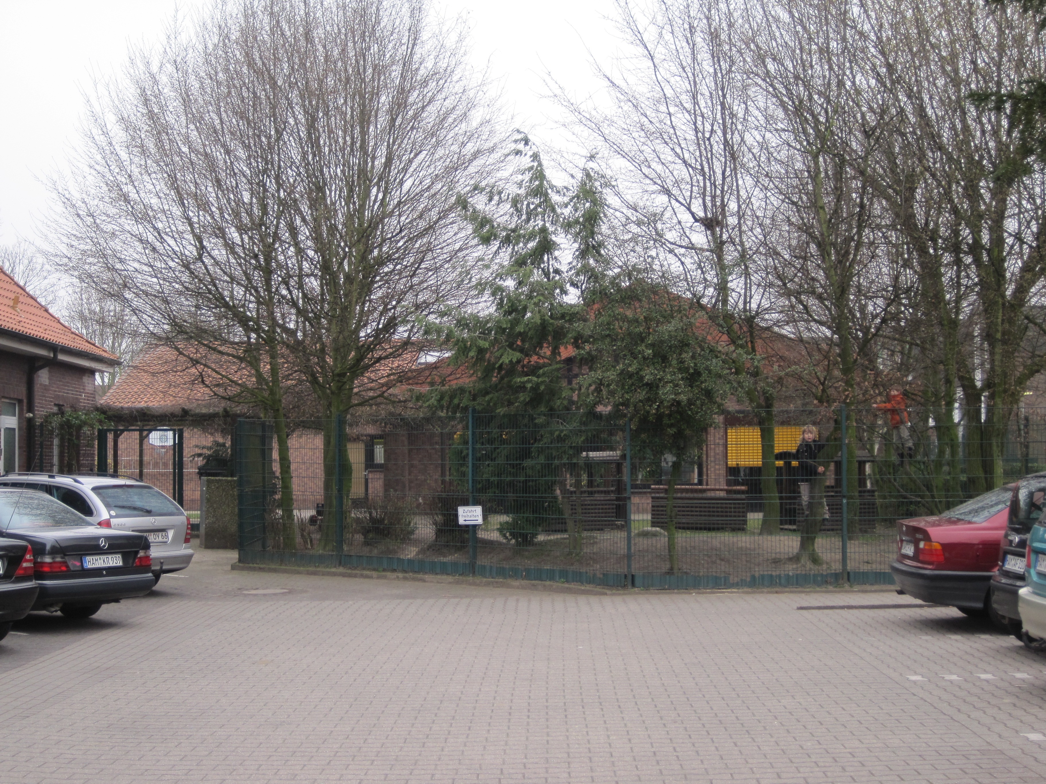 Das Foto zeigt den Kindergarten St. Marien neben dem Marienstift in Hamm-Bockum-Hövel.